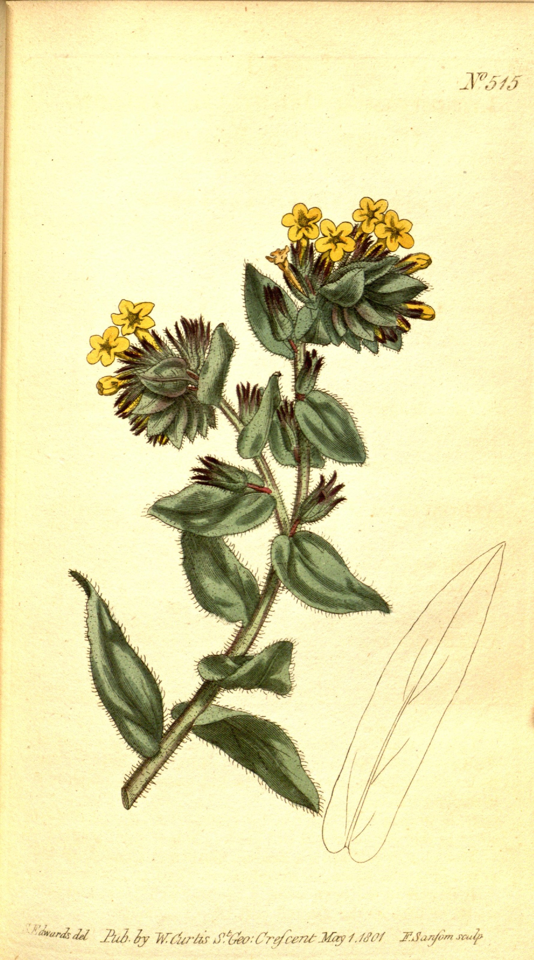 y".5/j "&.& JUl.fy WturilS,V'b«?:C-IY/'n-r2tMafi.Ul'/ FJj*/»via//.